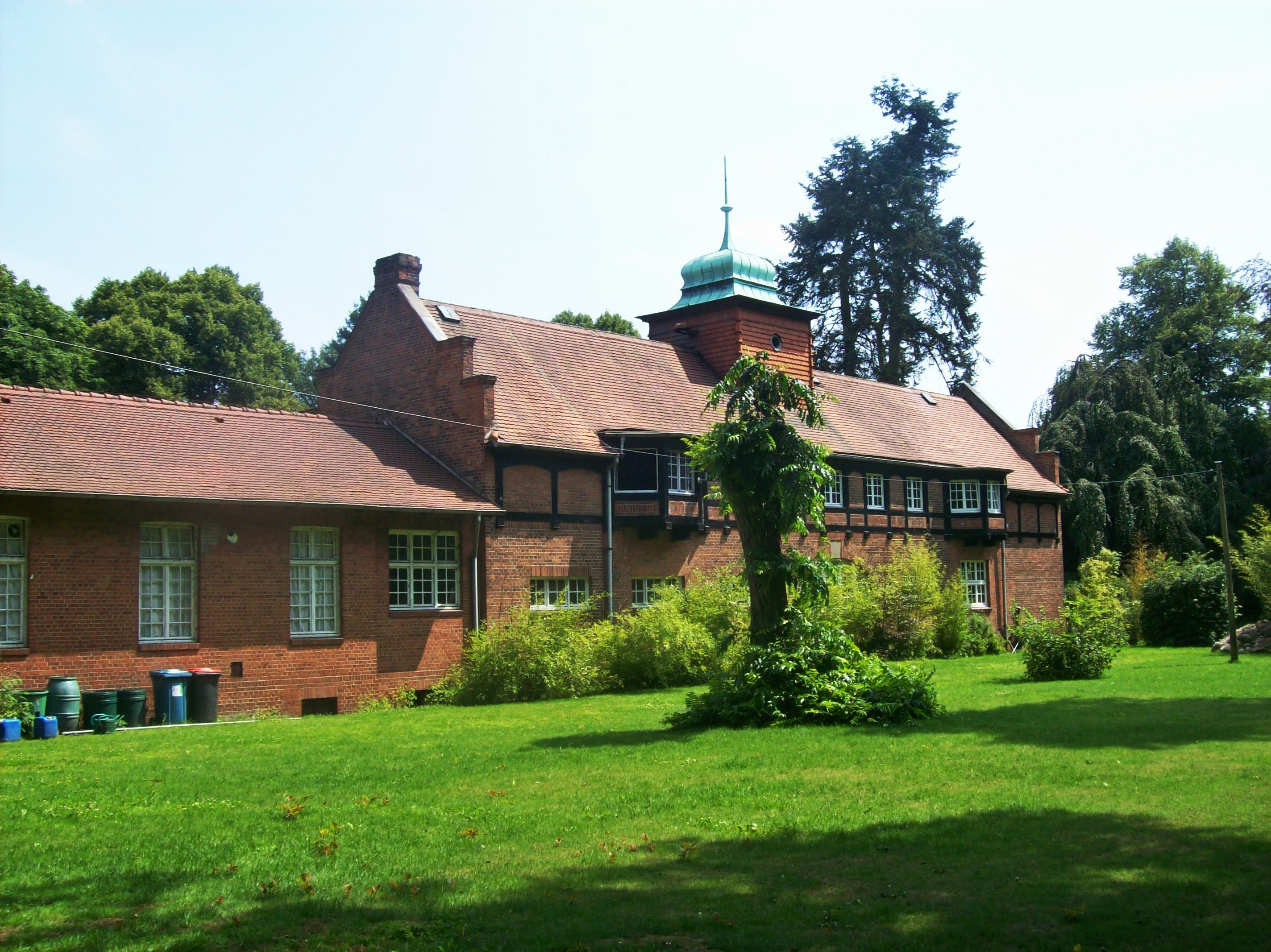 22885 Barsbüttel, Germany